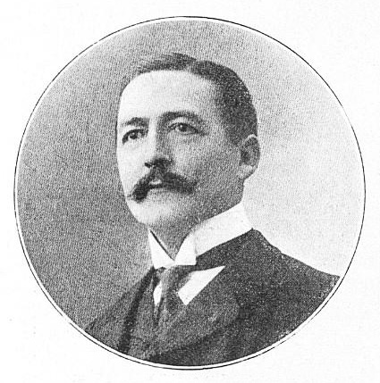 M. Merlaud-Ponty, Gouverneur général de l'Afrique Occidentale Française. Cliché Dépêche coloniale (in Exposition franco-britannique. Londres, 1908. Les Colonies françaises, p. 257